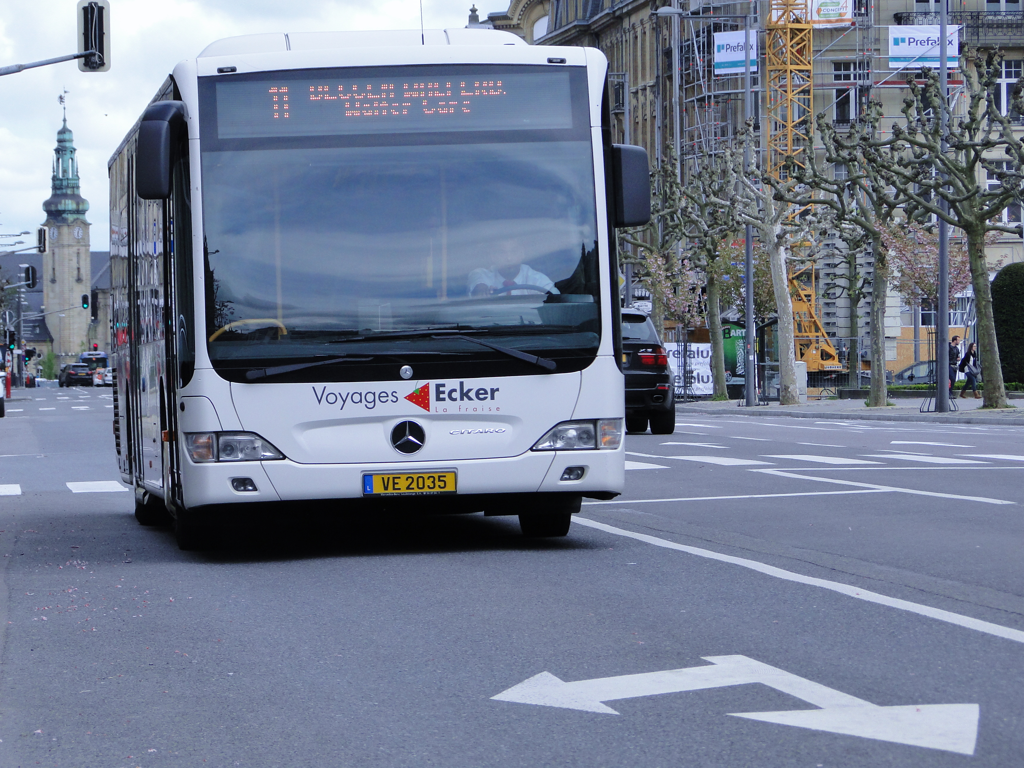 Bus ECKER am Optrag vum "Département des Transports" op der AVL-Linn 11 (VE 2035). Marque: Mercedes Fiert an der Neier Avenue op der Linn 11 Richtung Walfer Gare.